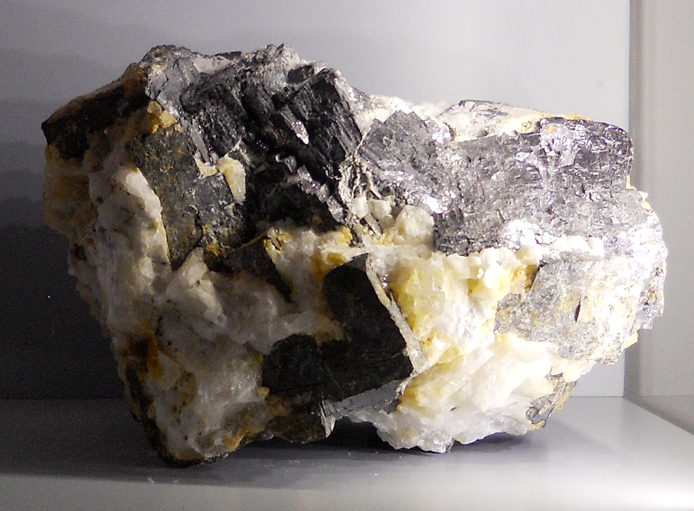 Bleierz im Haus Hövener